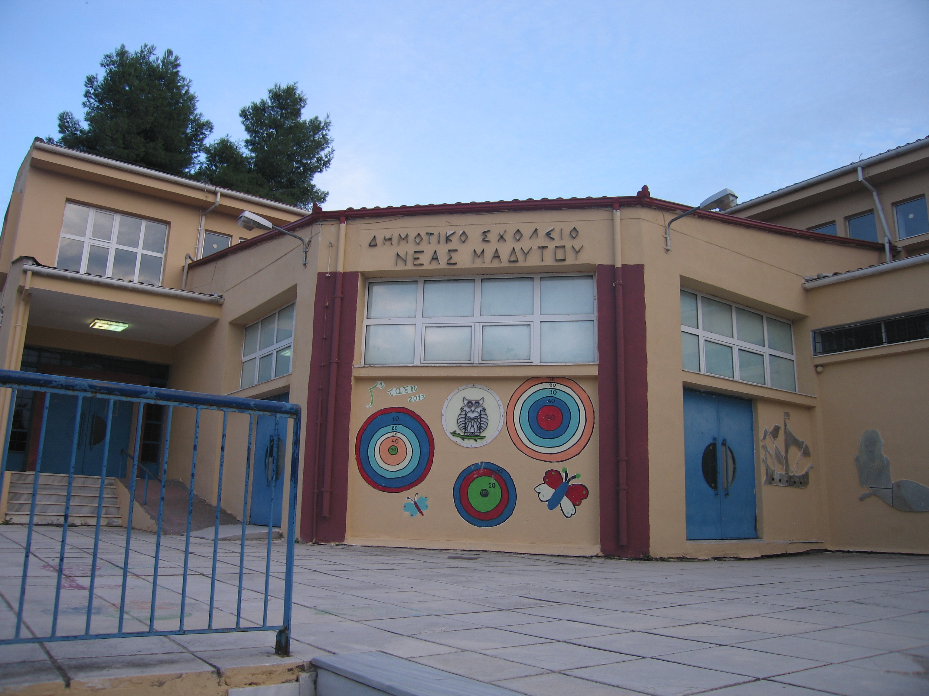 Δημοτικό Σχολείο Νέας Μαδύτου 2017